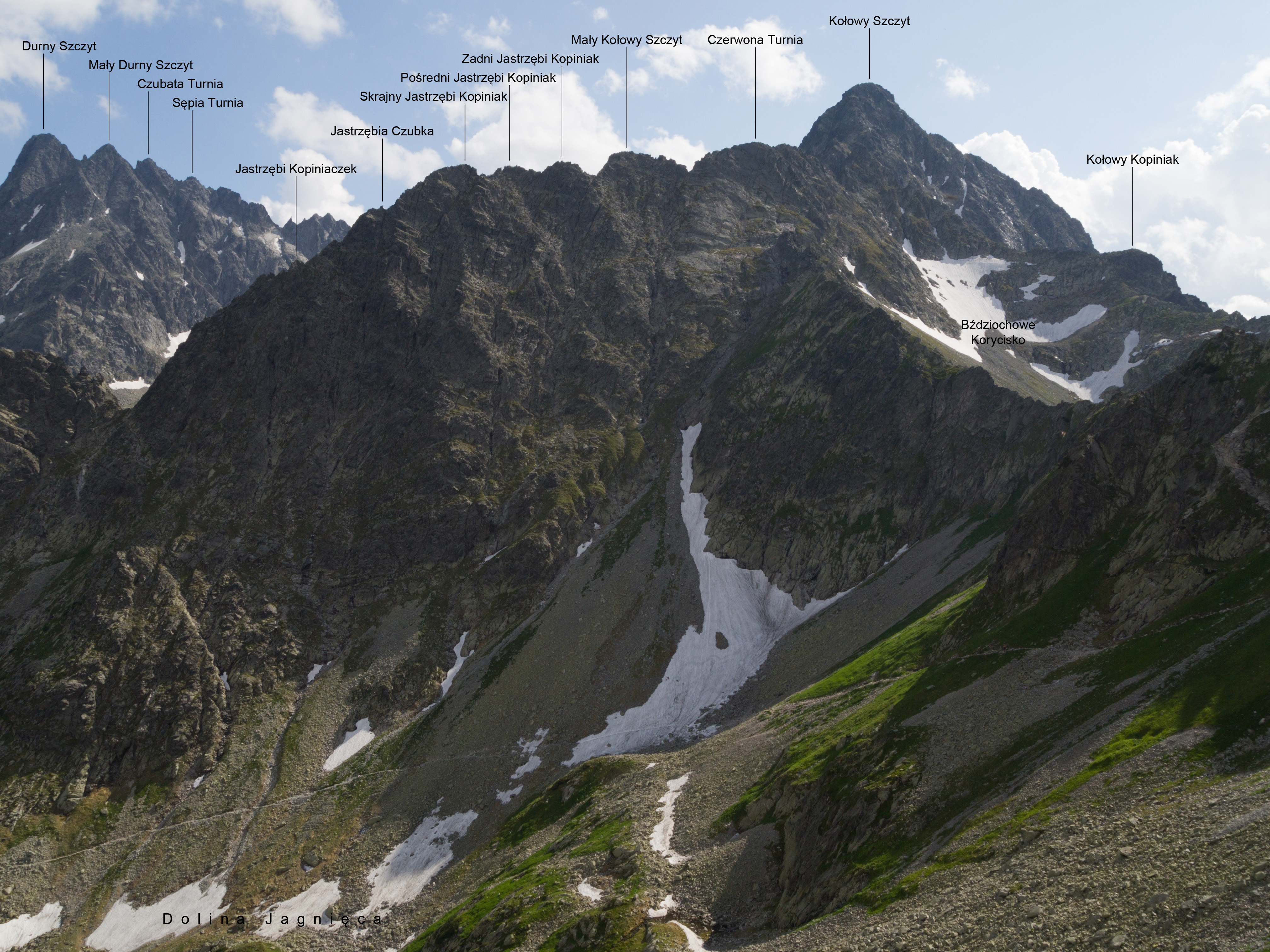 Jastrzębia Grań – widok z Koziej Grani, polskie podpisy szczytów.